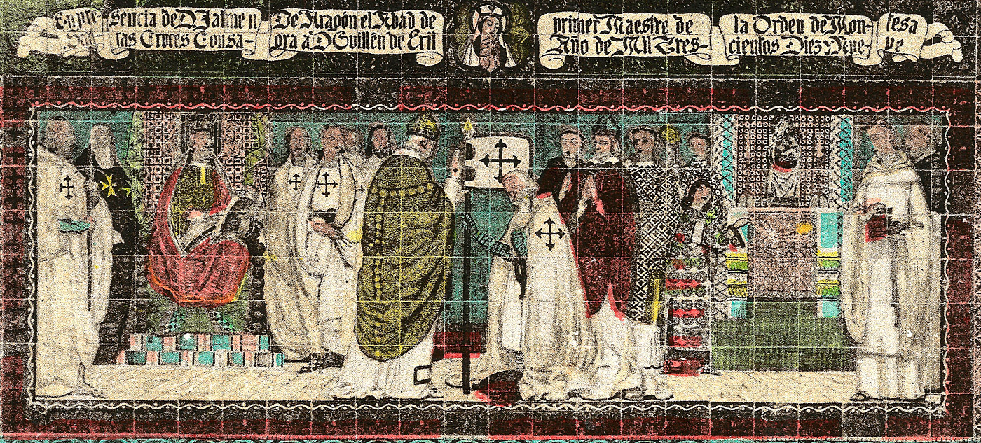 Fundación de la Orden de Montesa